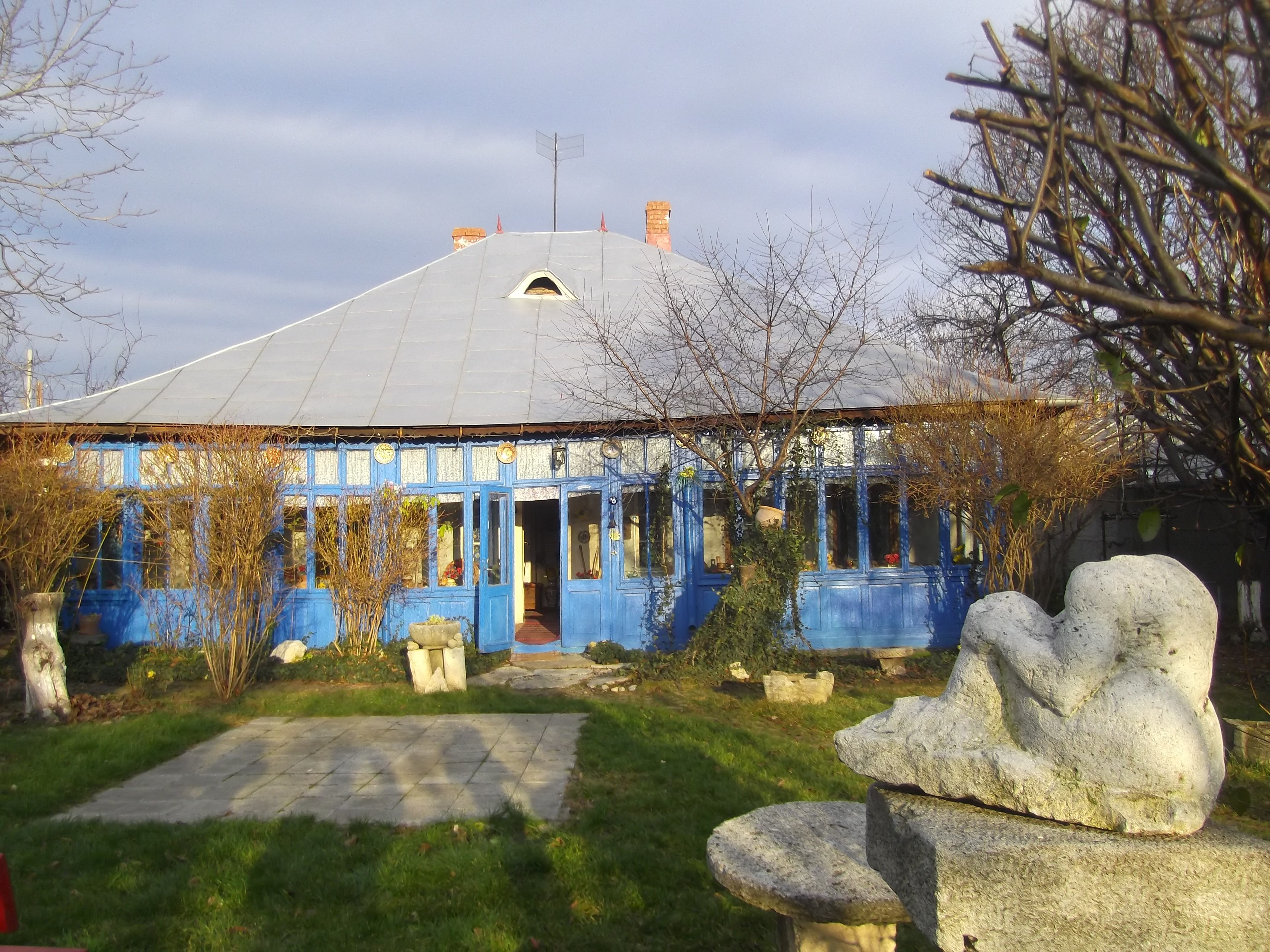 Casa Moșescu